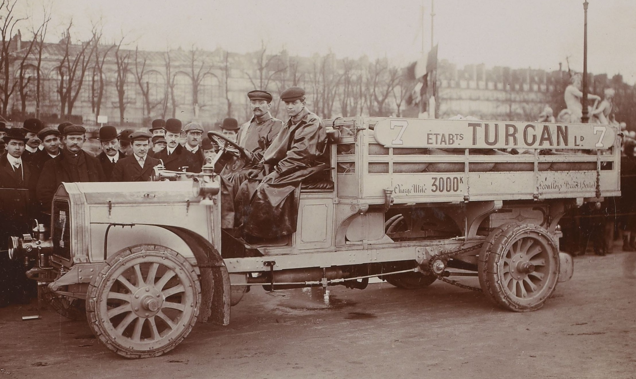 Camion Turgan 24CV, 4 cyl., 3000 kg.[Collection Jules Beau. Photographie sportive] : T. 33. AnnÃ©es 1906 et 1907 / Jules Beau : F. 9. [Paris-Marseille-Paris. 19 novembre-5 dÃ©cembre 1906]